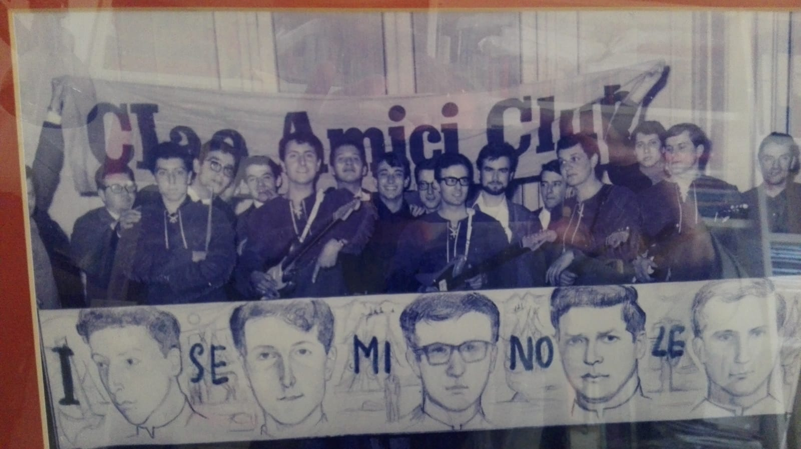 In questa foto d'epoca ancora la prima originaria formazione dei Seminole